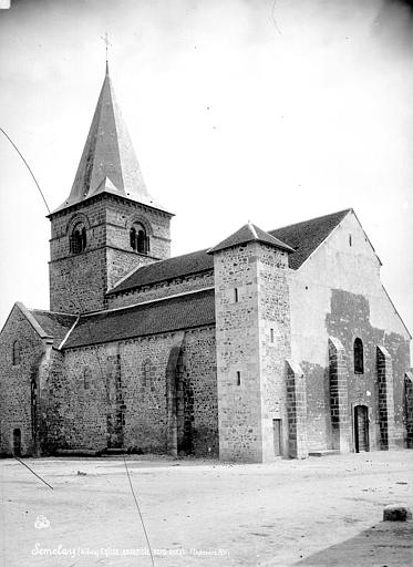 Eglise de Sémelay en 1891 (photographie de Médéric Mieusement)